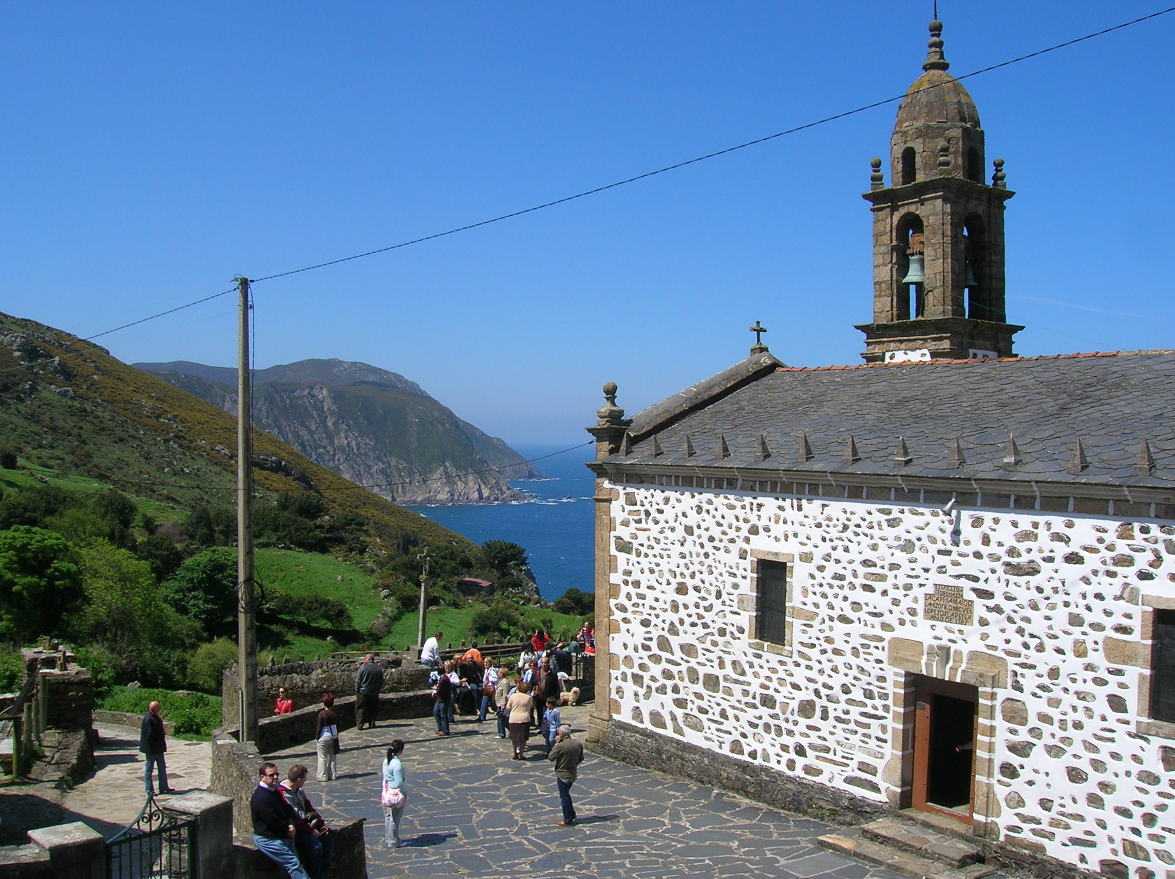 Santuario de Santo André de Teixido - Cedeira - A CoruñaSantuario de San Andrés de Teixido